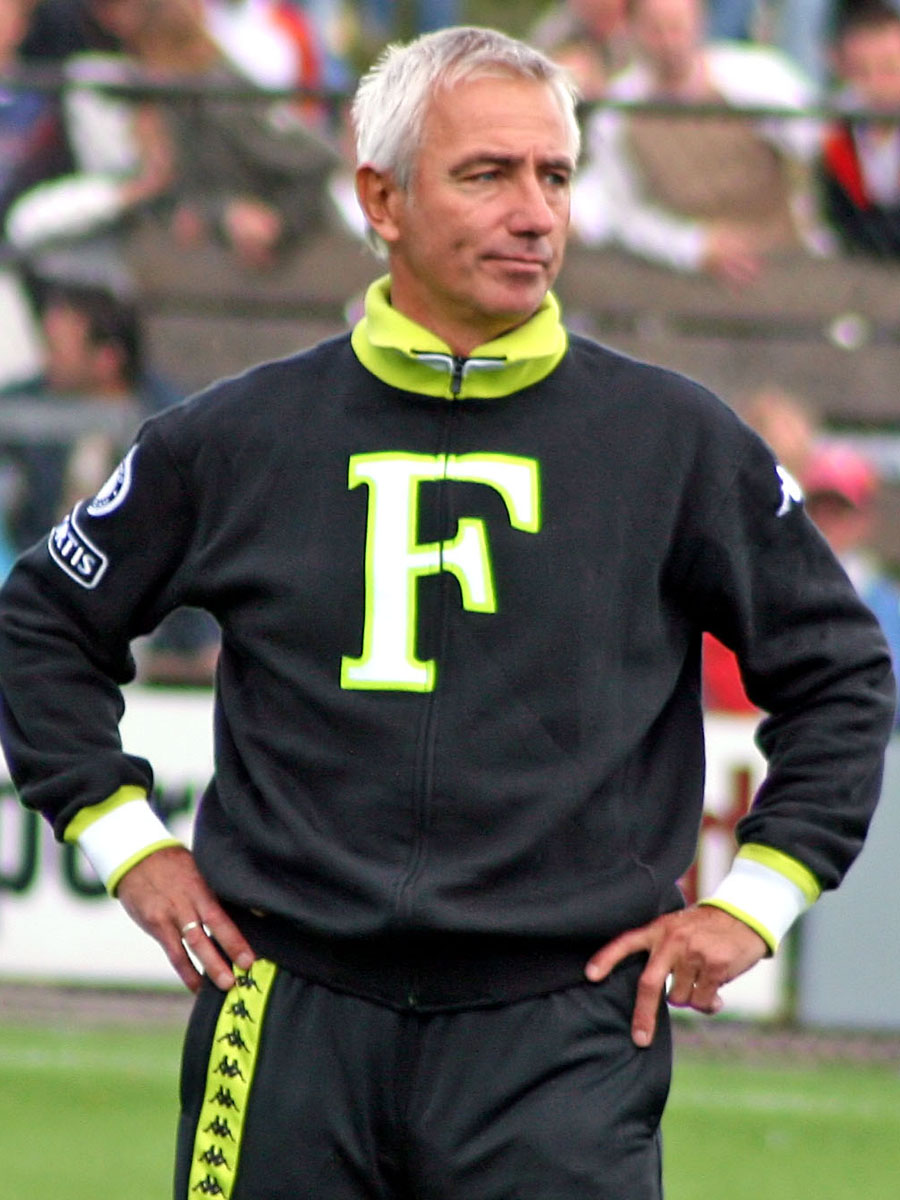 Bert van Marwijk (Feyenoord)